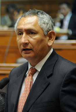 René Helbert Cornejo Díaz, Ministro de Vivienda, Construcción y Saneamiento y Primer Ministro del Perú (2013-2014).